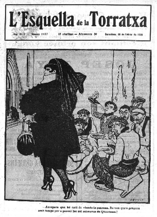 Revista La Esquella de la torratxa, Número 2137. 20-febrer-1920